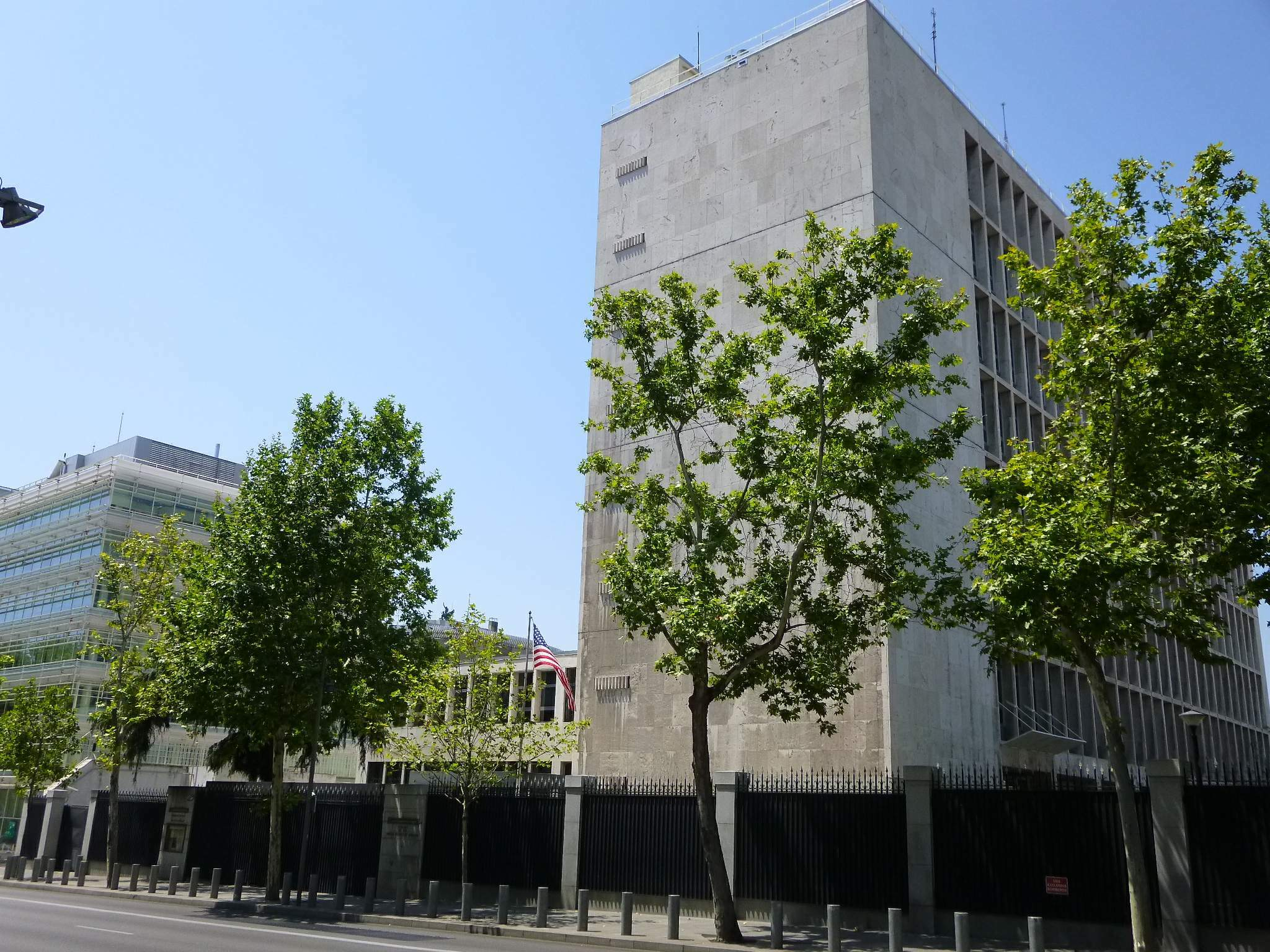 Embajada de Estados Unidos en Madrid